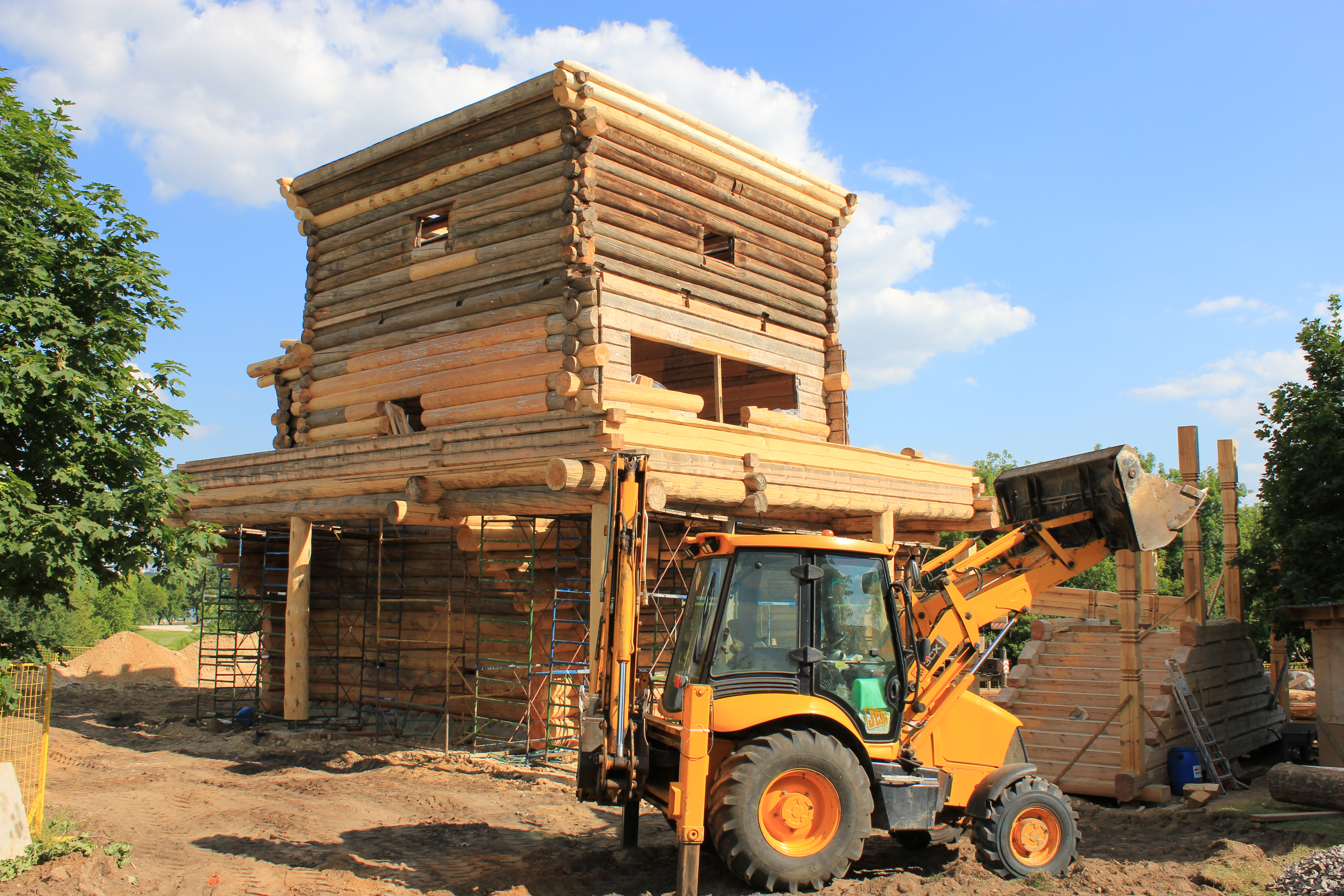 Сборка церкви Святого Георгия Победоносца в Коломенском. Построена в 1685 году в Архангельской области.